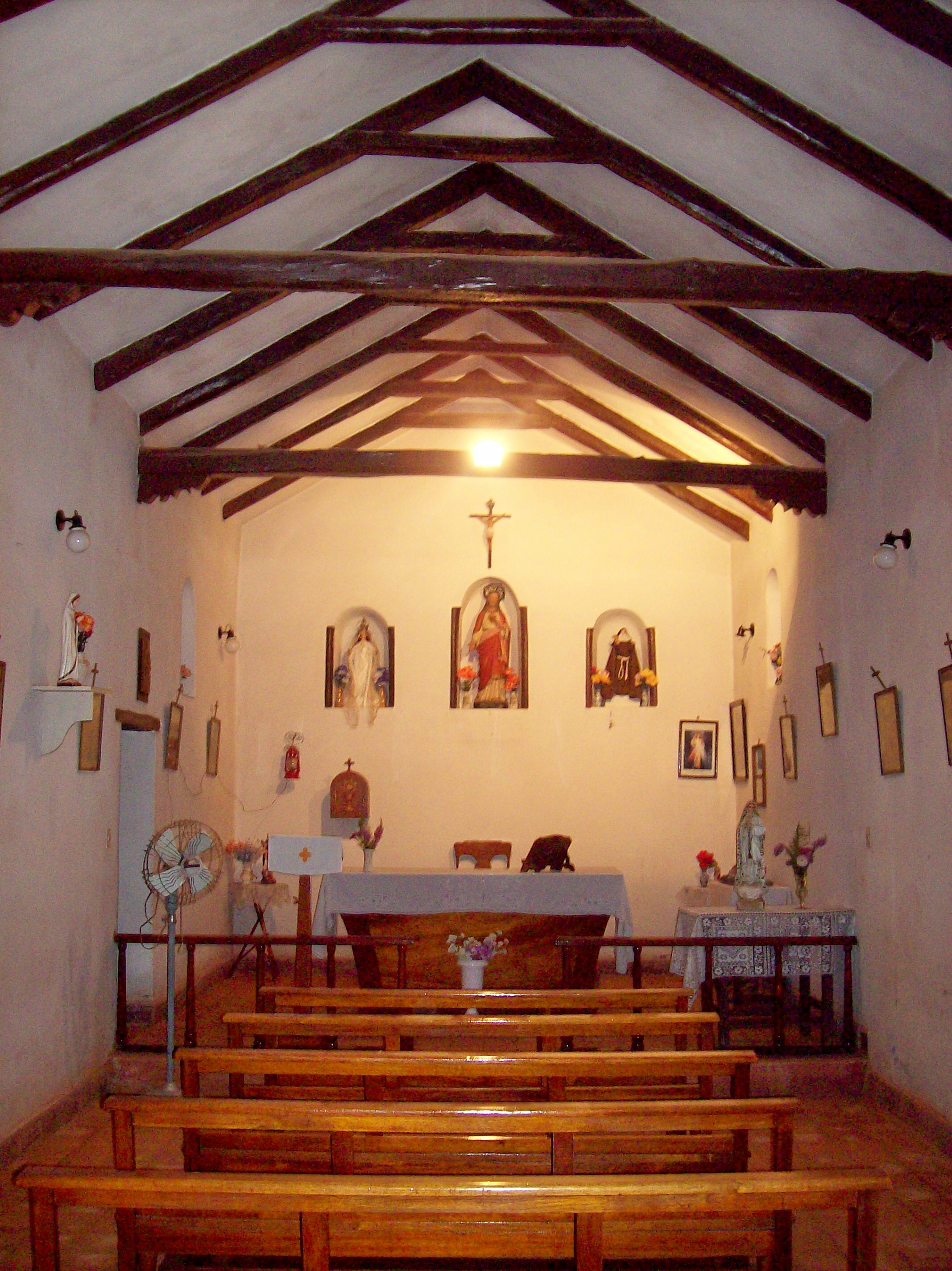 Interior de la Capilla de Santa Clara de Asís, también conocida como capilla de Los Sarmientos, (por ser la localidad en la que se encuentra), en la provincia argentina de La Rioja.